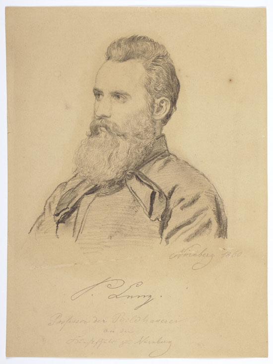 Porträt Peter Lenz (Desiderius Lenz)